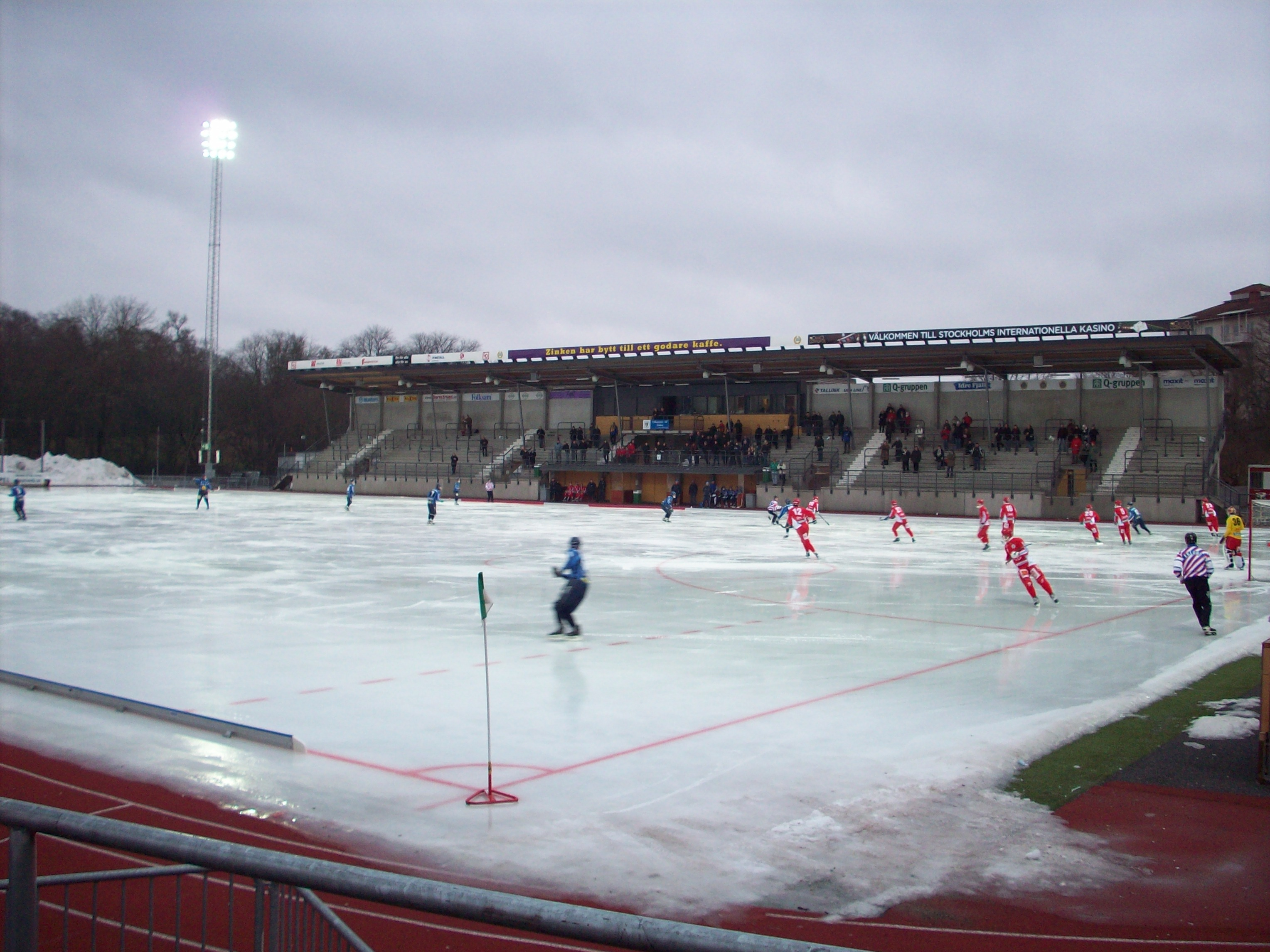 Zinkensdamms IP during a match between Djurgårdens IF and Gustavsberg.